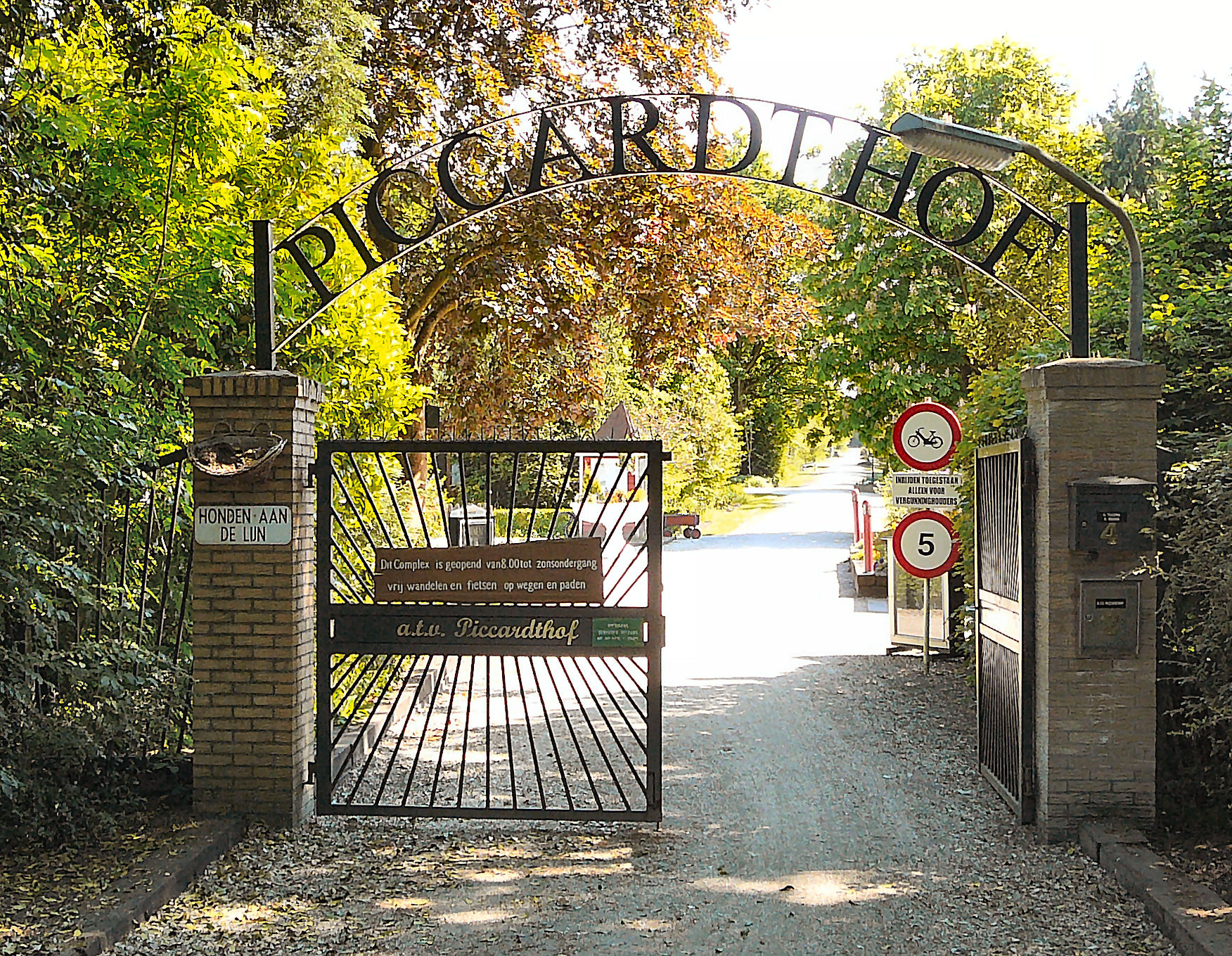 Ingang Piccardthof.